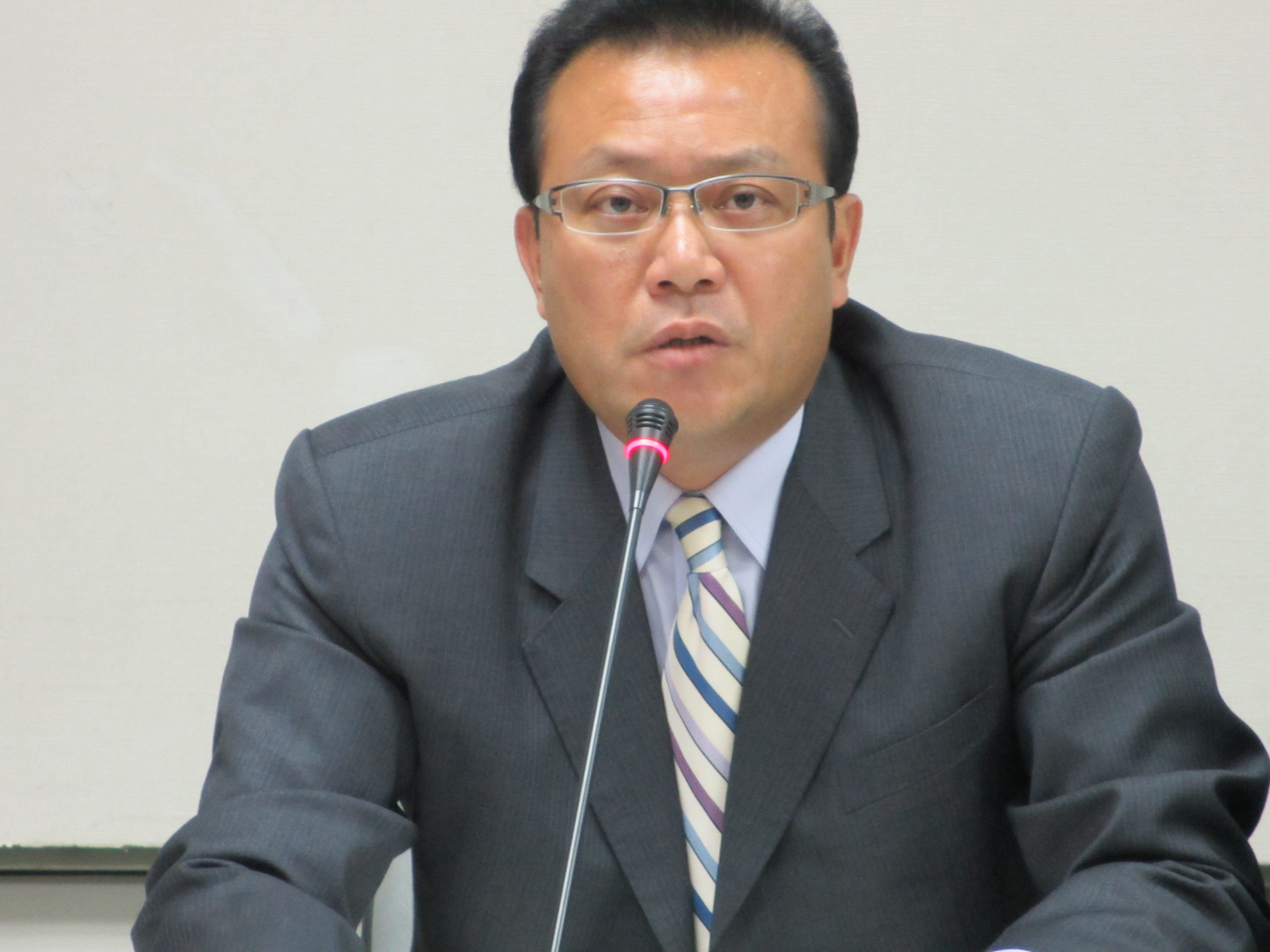 在野党民进党立委 苏震清（美国之音张永泰拍摄）